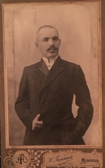 Lev_Libermann